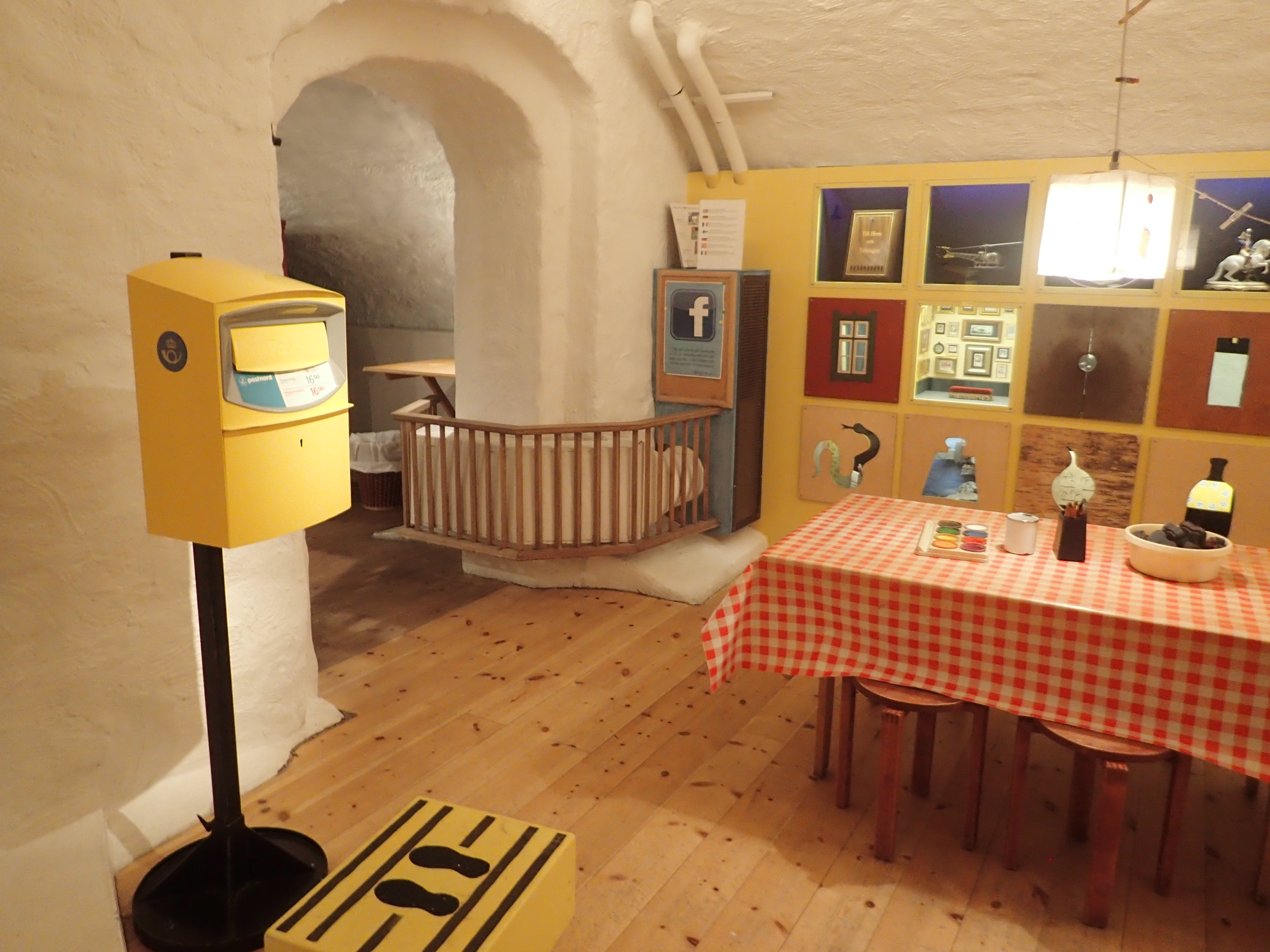 Postmuseum i Stockholm 2017